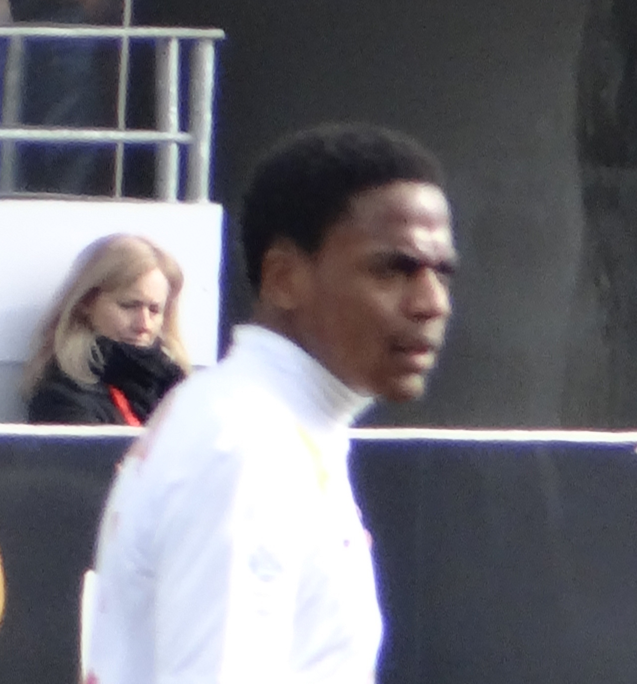 Match de football (Ligue 1) entre le Stade brestois 29 et l'Olympique lyonnais, le 3 mars 2013